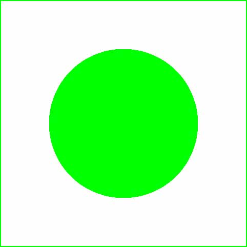 Wegmarkierung grüner Punkt